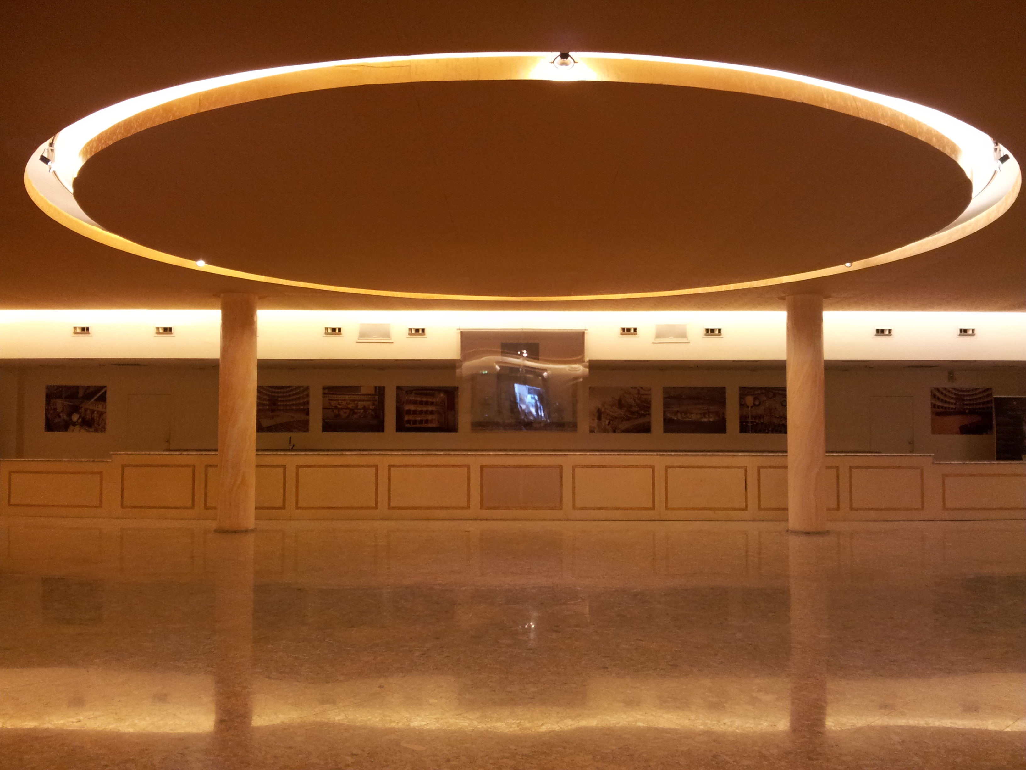 Il nuovo foyer del Real Teatro di San Carlo di Napoli